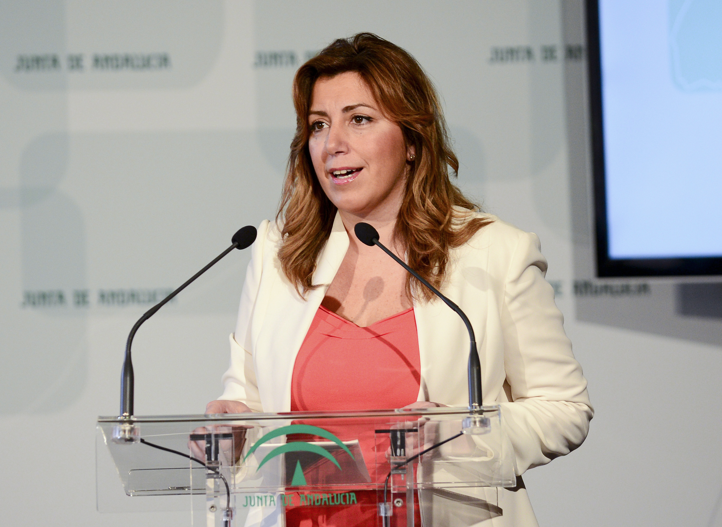 Susana Díaz